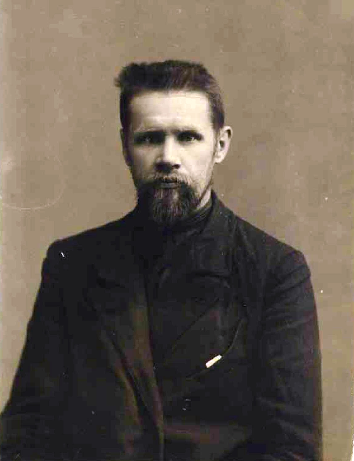 Егоров, Николай Максимович